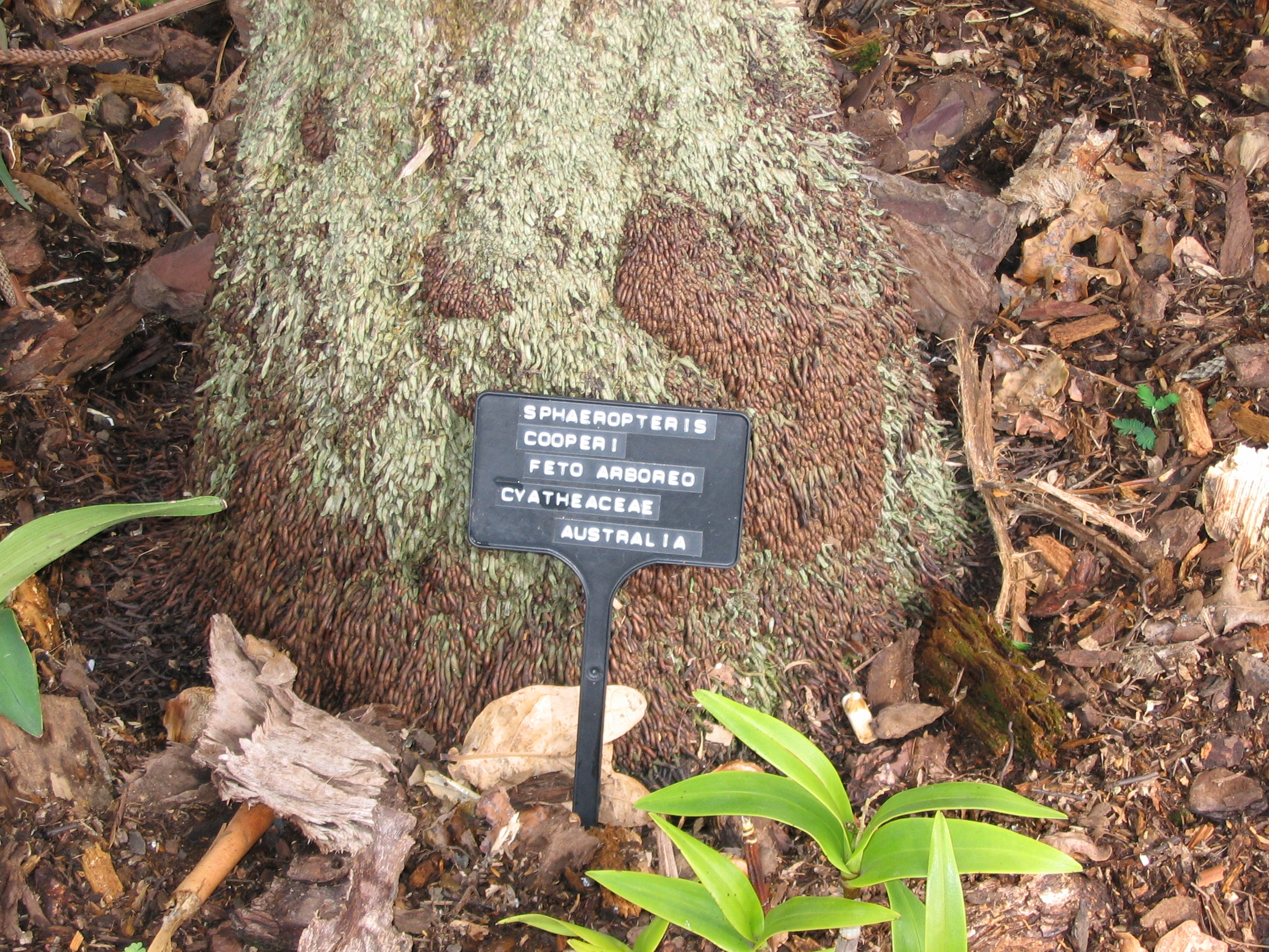 Sphaeropteris cooperi páfrányfa szára (botanikus kert, Funchal)